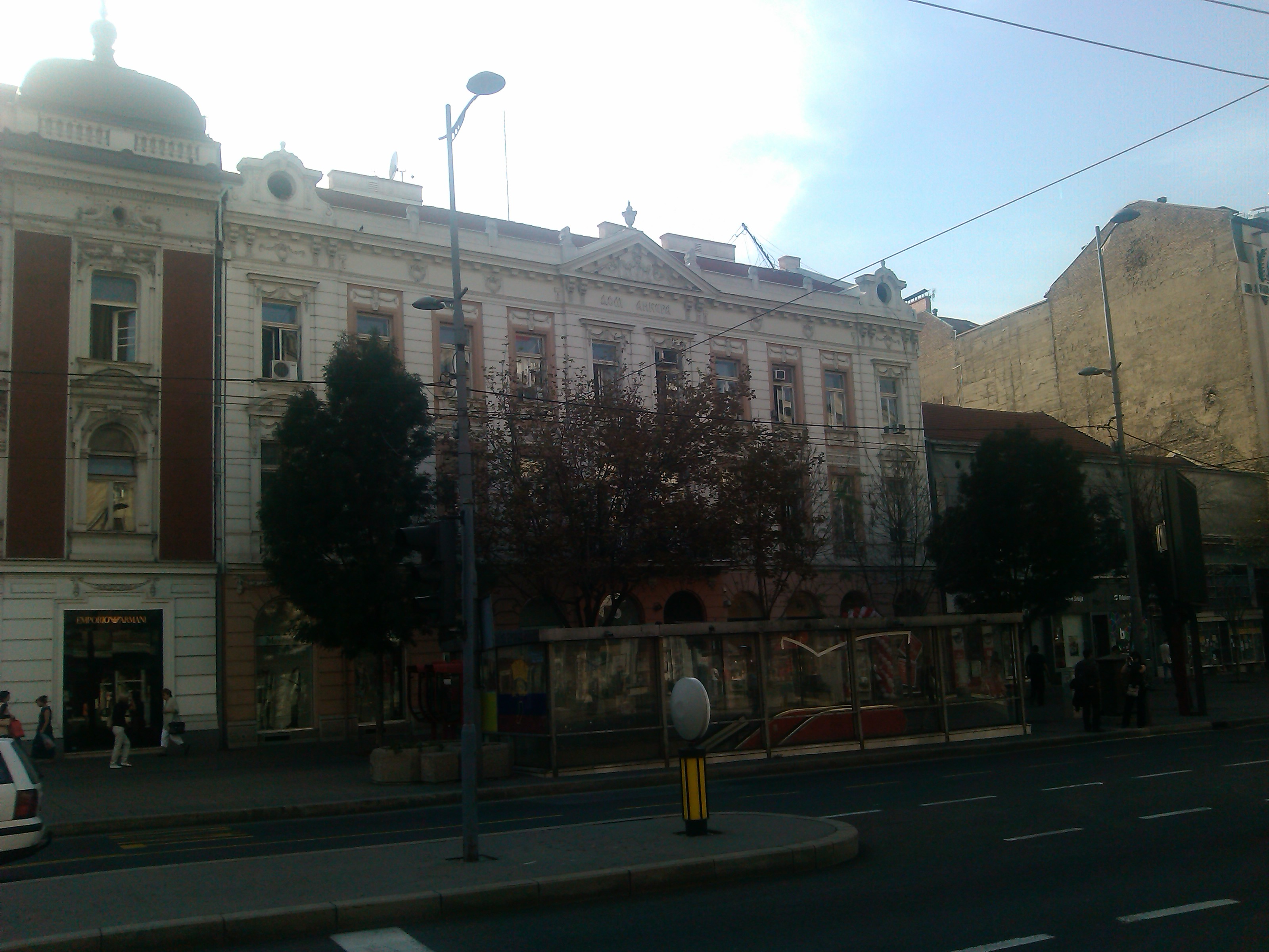 Палата „Анкер“